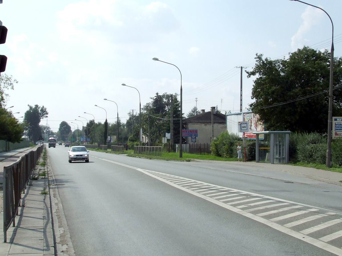 Ożarów Mazowiecki, szosa poznańska - ulica Poznańska